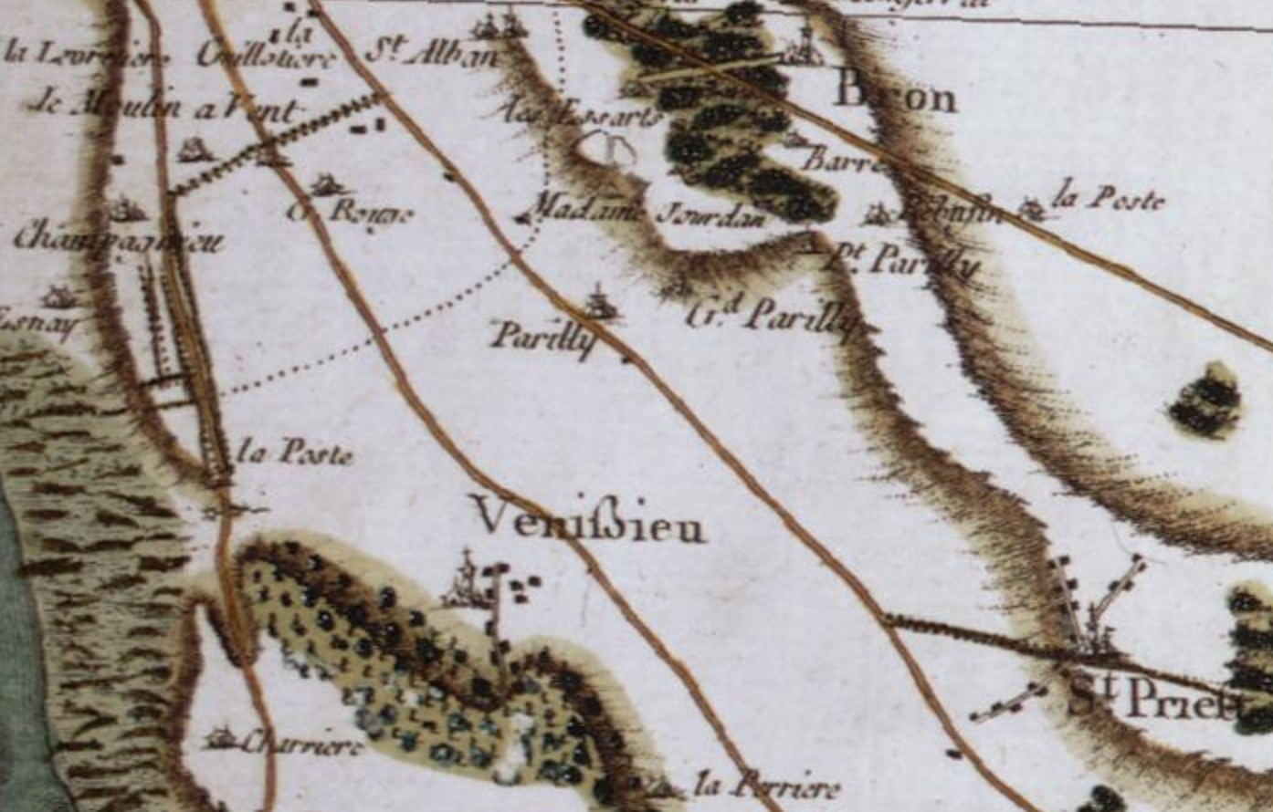 Carte N°118 de la carte de France, environs de Belley par César-François Cassini de Thury. [1758-1760]